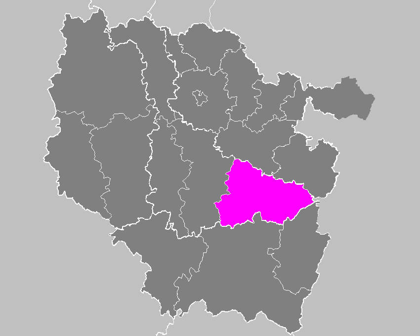 Maps of arrondissements and cantons of France: Arrondissement de Lunéville.PNG